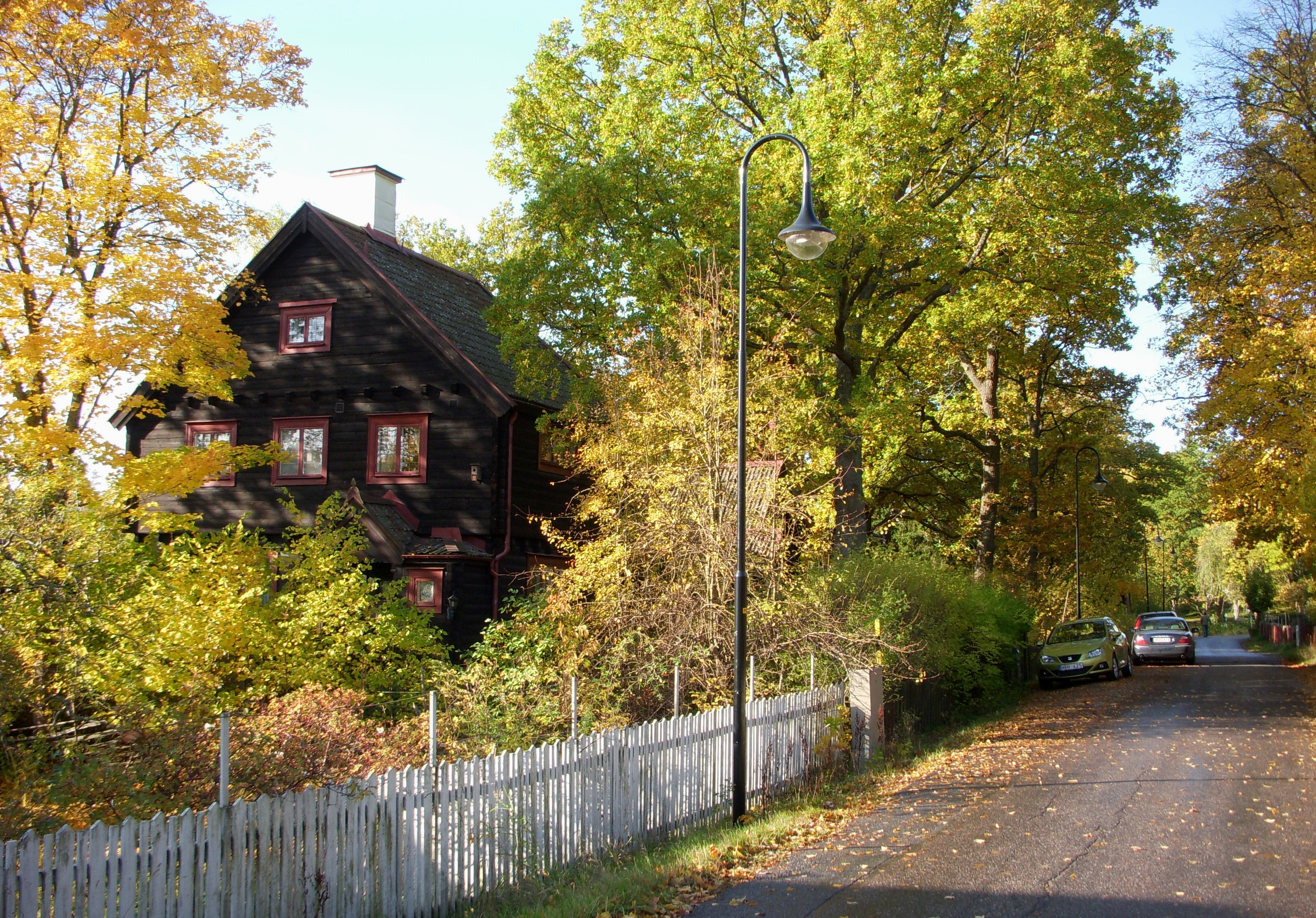 Villa Wallbeck-Hallgren, Parkvägen 46, Storängen, Nacka